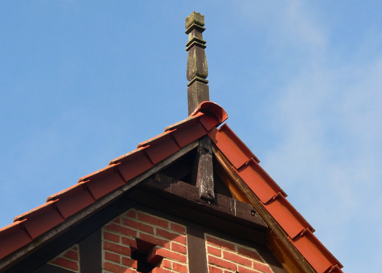 Wendenknüppel im Hannoverschen Wendland